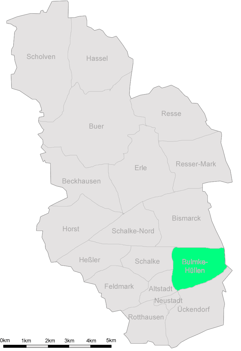 Beschreibung: Von Marc Schuelper erstelle Karte von Gelsenkirchen mit den 18 Stadtteilen. Stadtteil Beckhausen markiert. Description: By Marc Schuelper provided map of Gelsenkirchen with its 18 quarters. Highlighted quarter Beckhausen.